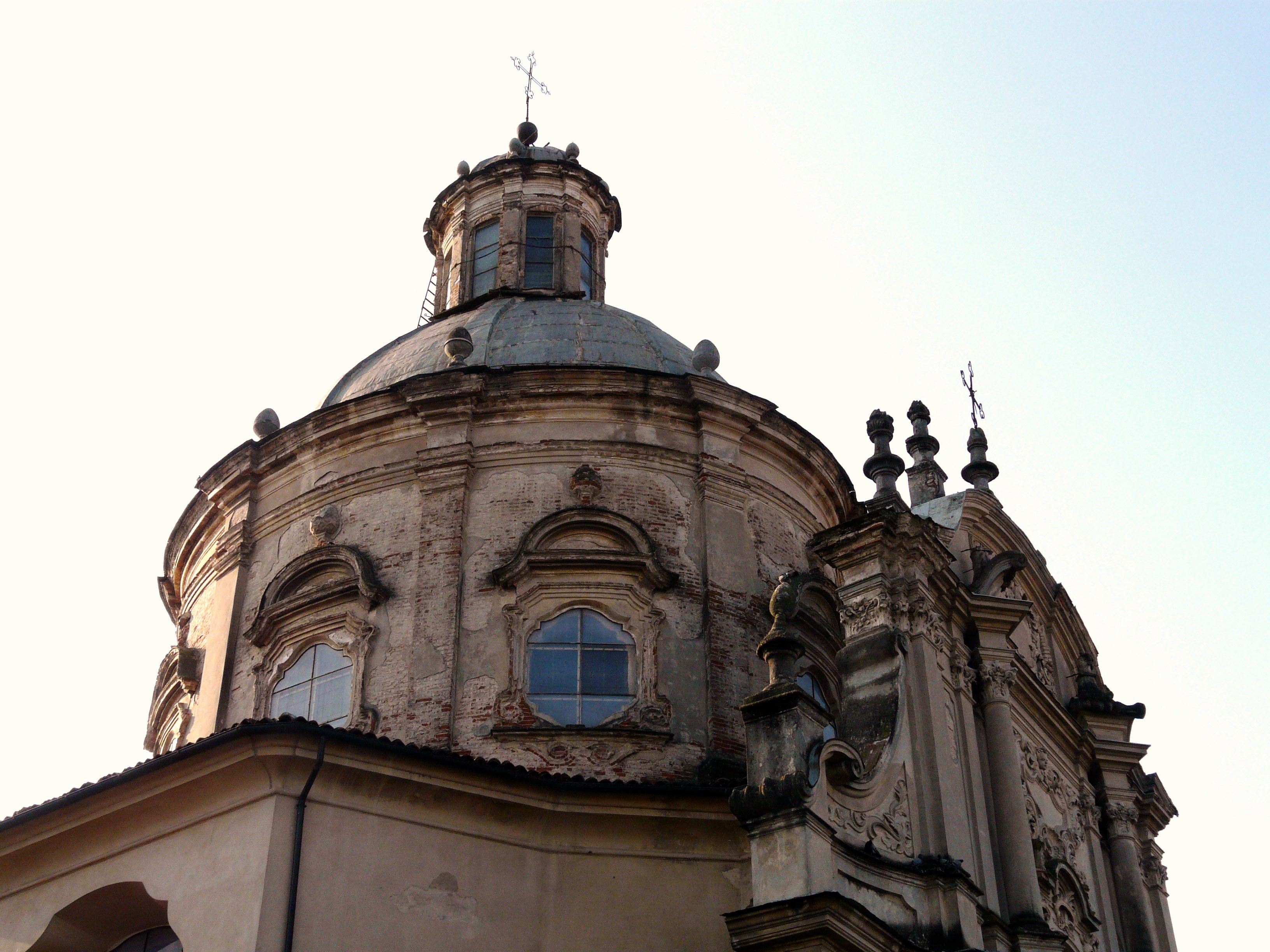 Chiesa di Santa Caterina, Casale Monferrato, Piemonte, Italia